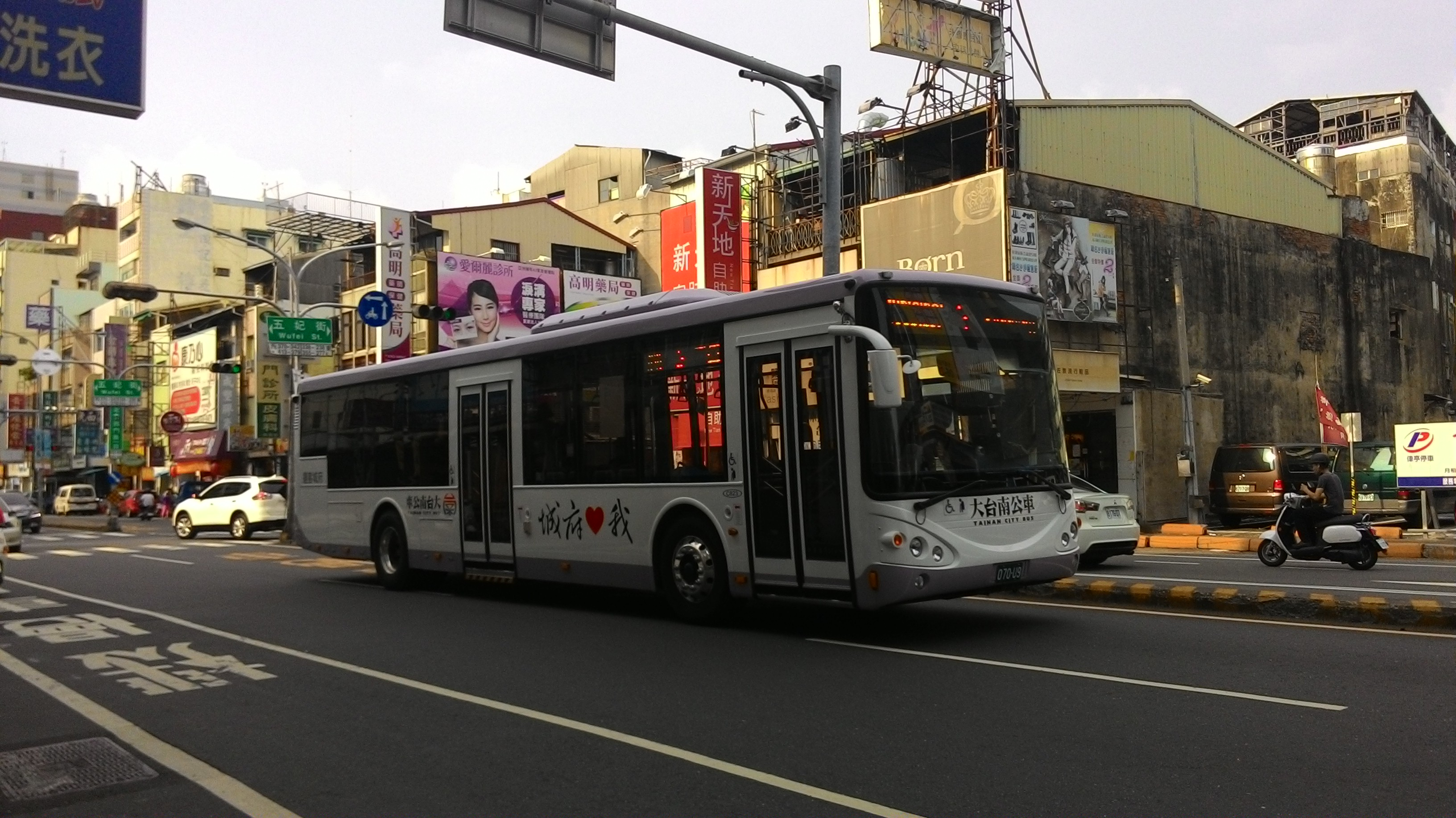 府城客運申沃低底盤公車070-U9